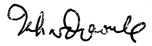 Signature de Tahar Djaout, scan d'un livre dédicacé à l'User. Cette image ou le texte qui y est représenté est seulement composé de formes géométriques simples et de texte. Elle n’atteint pas le seuil d'originalité nécessaire pour la protection du droit d’auteur, et est donc du domaine public.